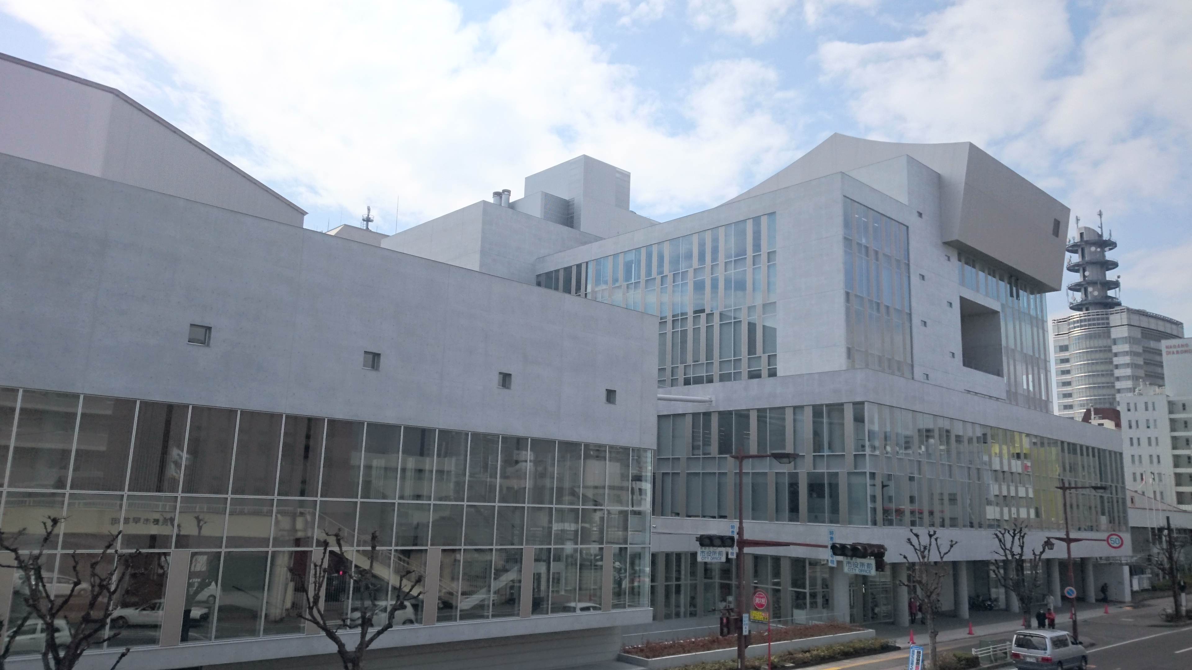 長野市役所第一庁舎